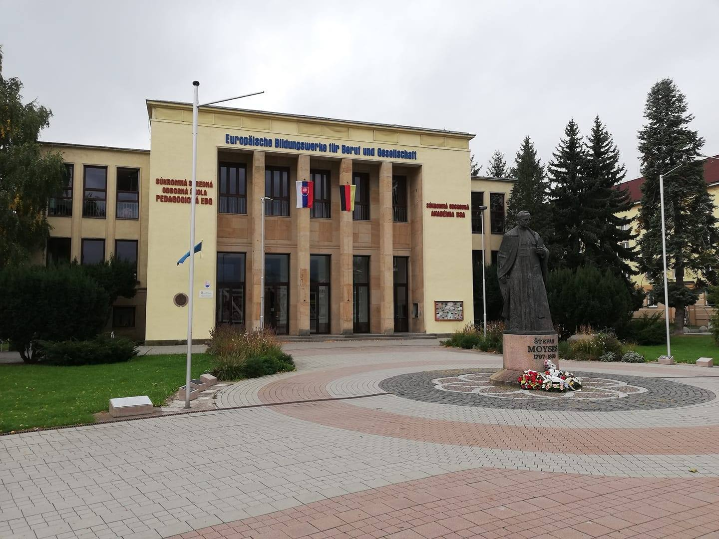 Budova Súkromnej obchodnej akadémie DSA v Žiari nad Hronom na Námestí Matice Slovenskej 23